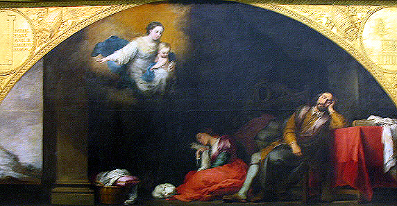 La obra, que está inspirada en la fundación de la Basilica di Santa Maria Maggiore de Roma, representa el momento en que el patricio Juan tuvo un sueño en el que se le apareció la Virgen María y el Niño Jesús.